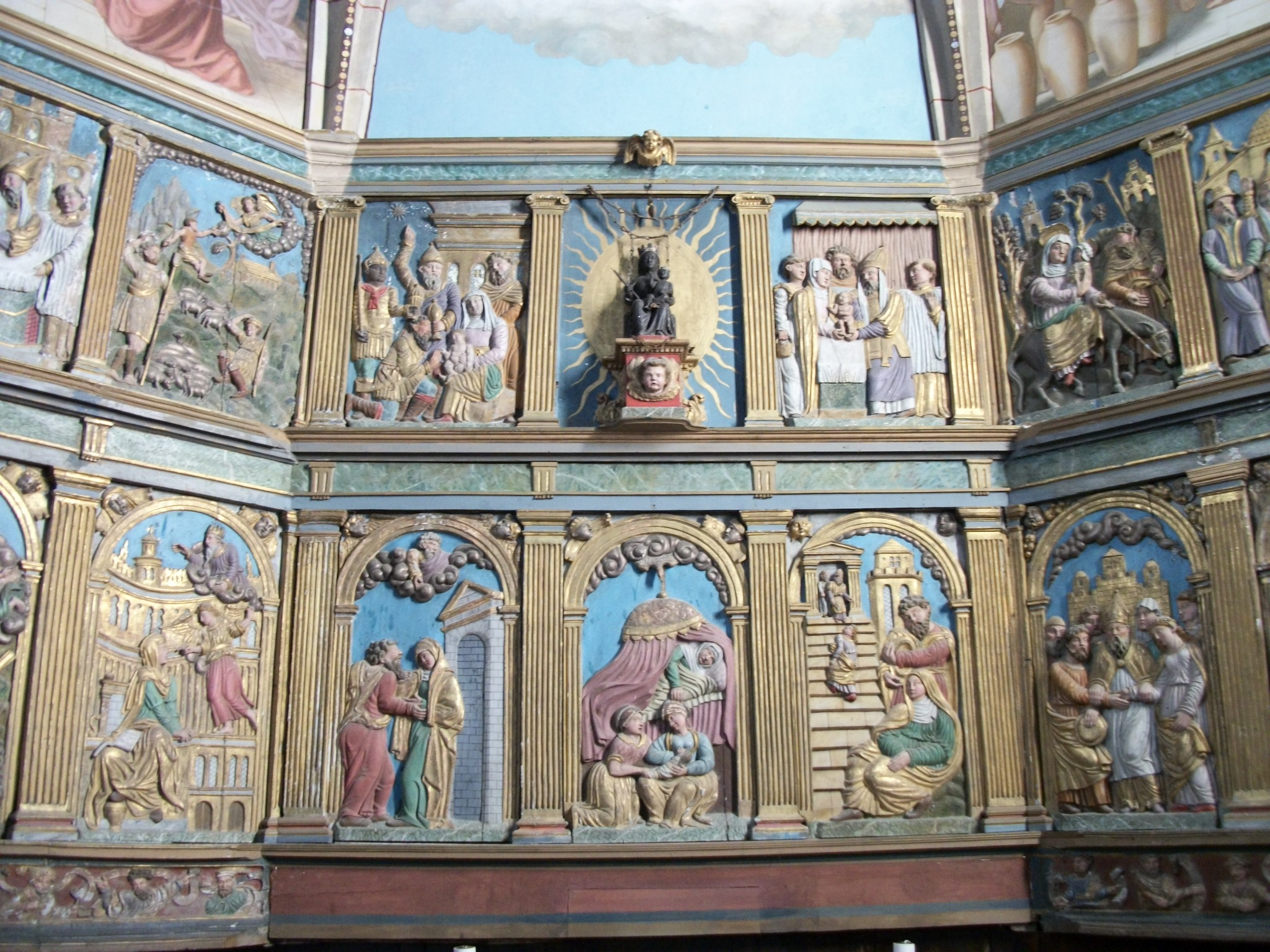 Le panneau centrale du retable avec au centre une statue de la Vierge noire